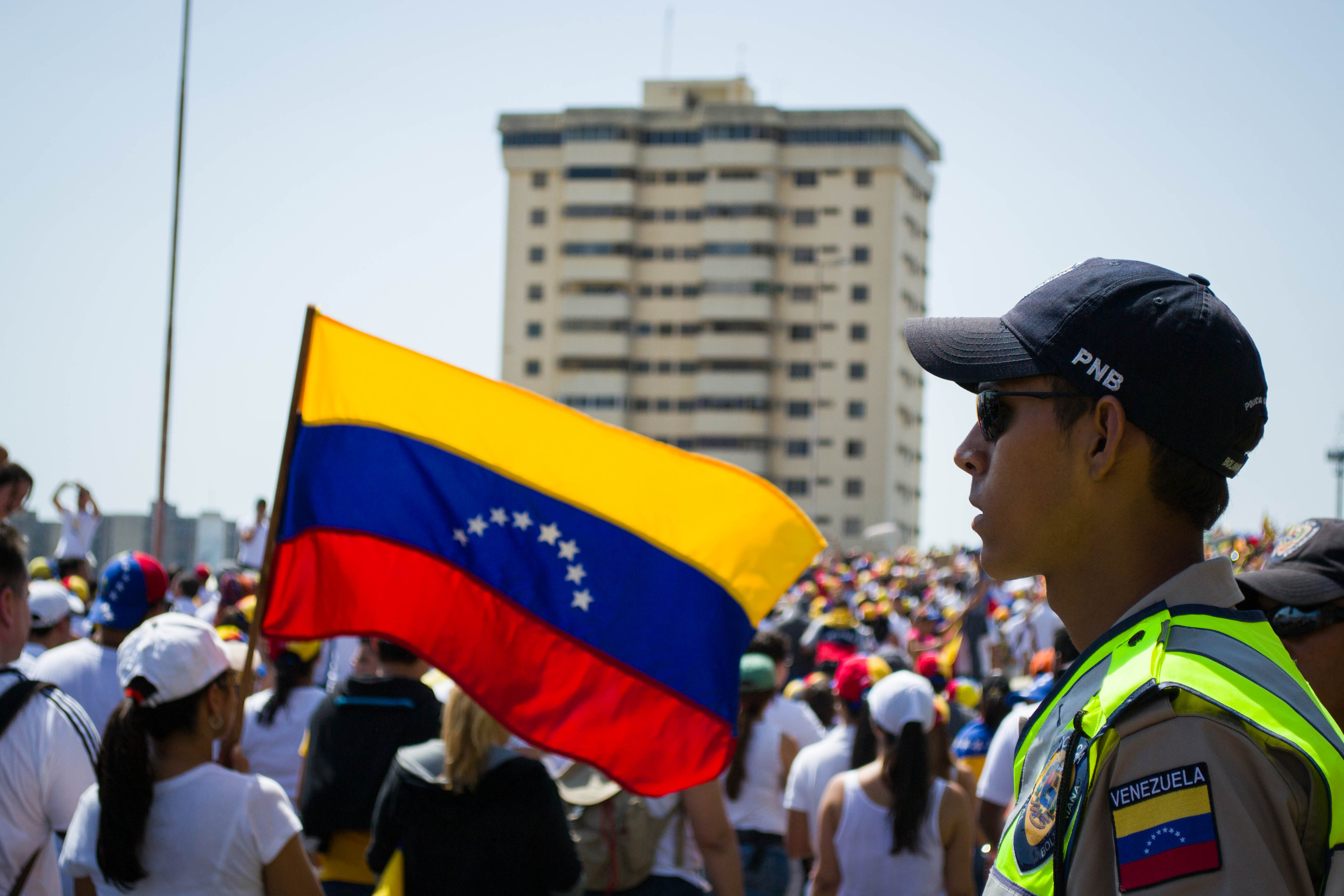 La gente de la oposición marchó pacíficamente hasta las inmediaciones del Palacio de Justicia de la ciudad de Maracaibo.